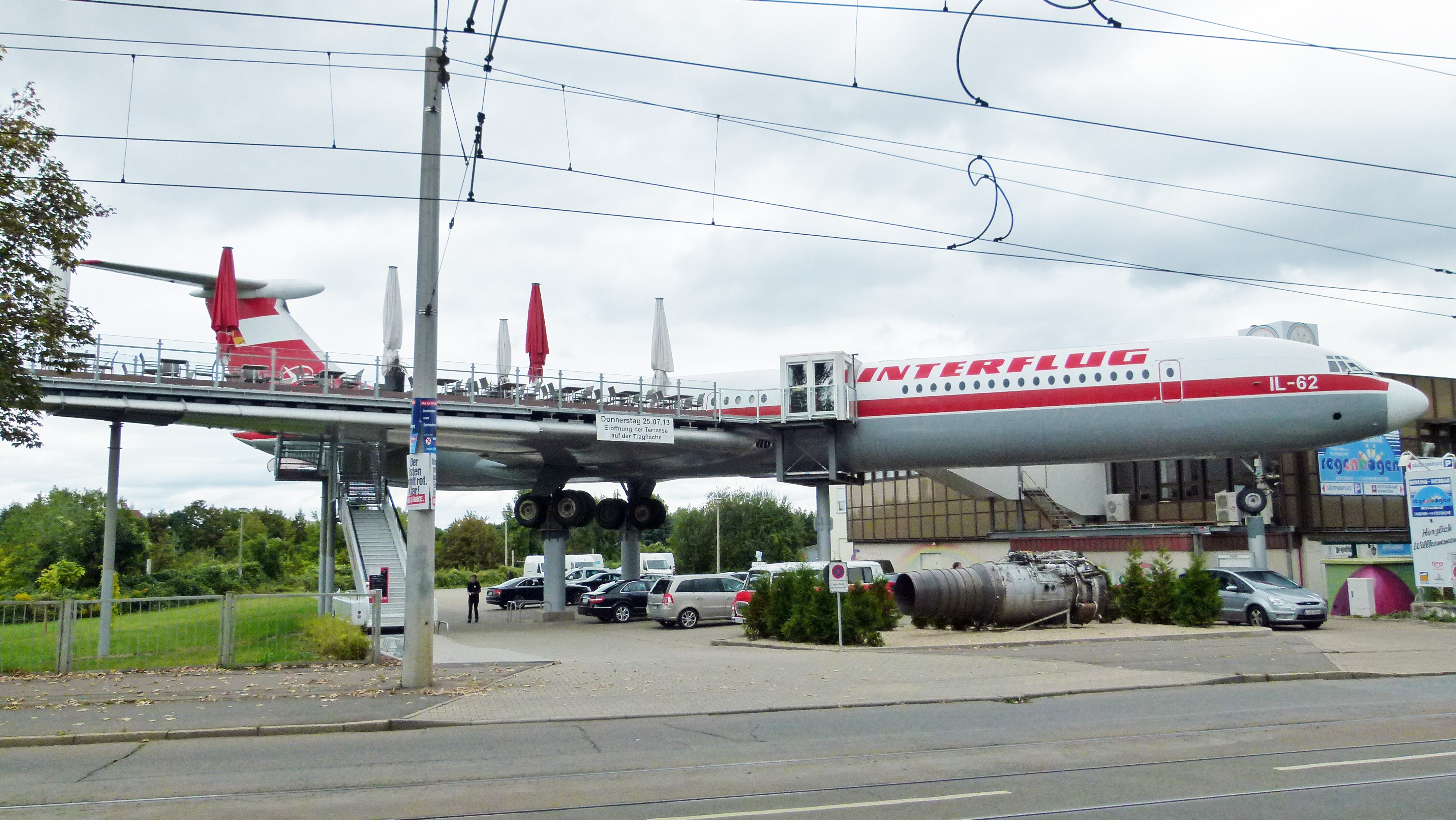 Technisches Denkmal Flugzeug Iljuschin, Arno-Nitzsche-Straße 43, Marienbrunn, Leipzig